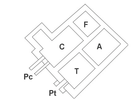 Schematische Umrissdarstellung des römischen Bades von Wurmlingen auf der Basis von Bild:Wurmlingen Badegebäude.jpg